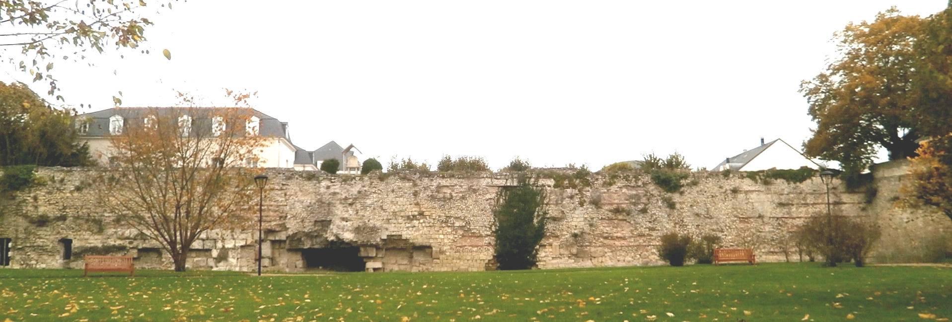 Vue panoramique des vestiges de la muraille sud du castrum